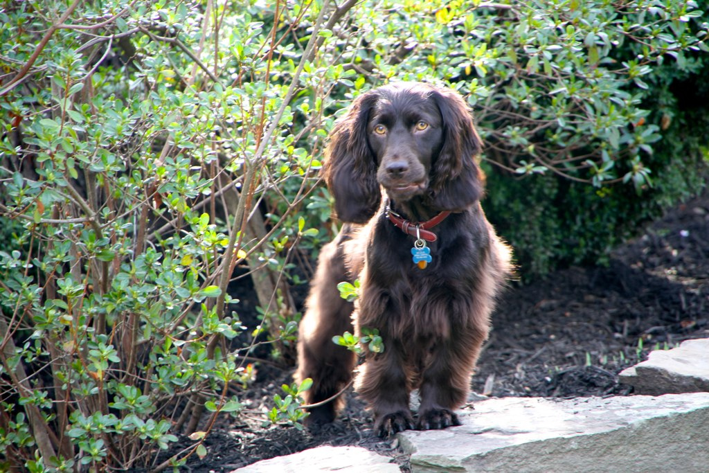 A Boykin Spaniel.